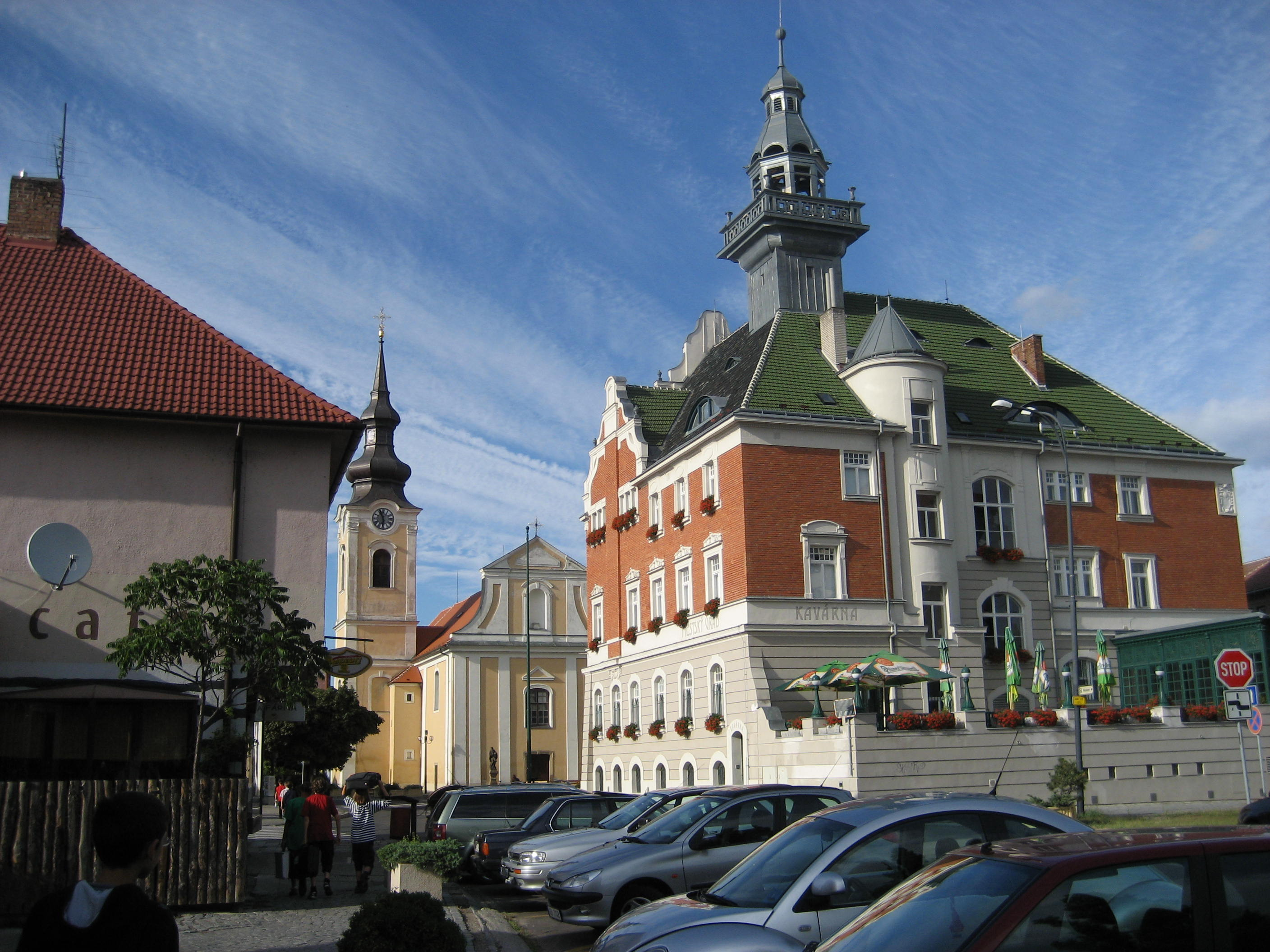 Stadtzentrum von Hodonin